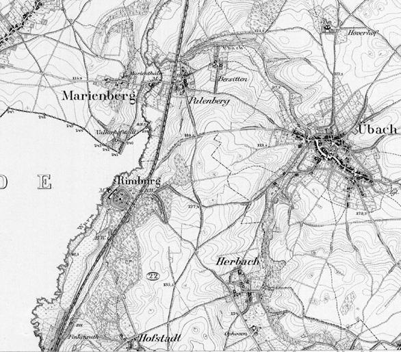 Location of Rimburg